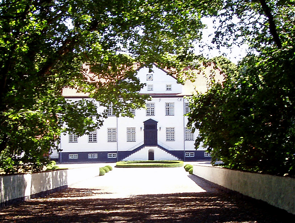 Stensballegård er en gammel hovedgård, der nævnes første gang i 1341 og ligger i den sydlige del af Stensballe. Gården ligger i Vær Sogn i Horsens Kommune. Hovedbygningen er opført i 1692-1693, tilbygget i 1867-1943.